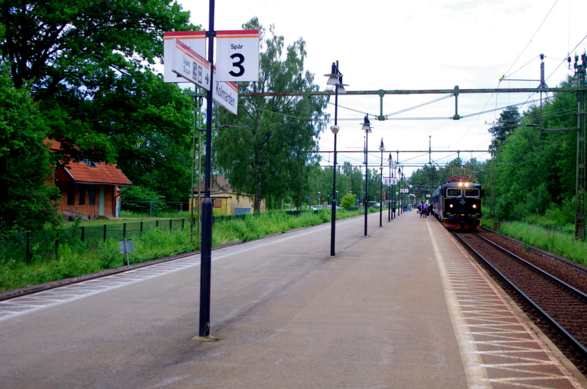 Kolmården järnvägsstation